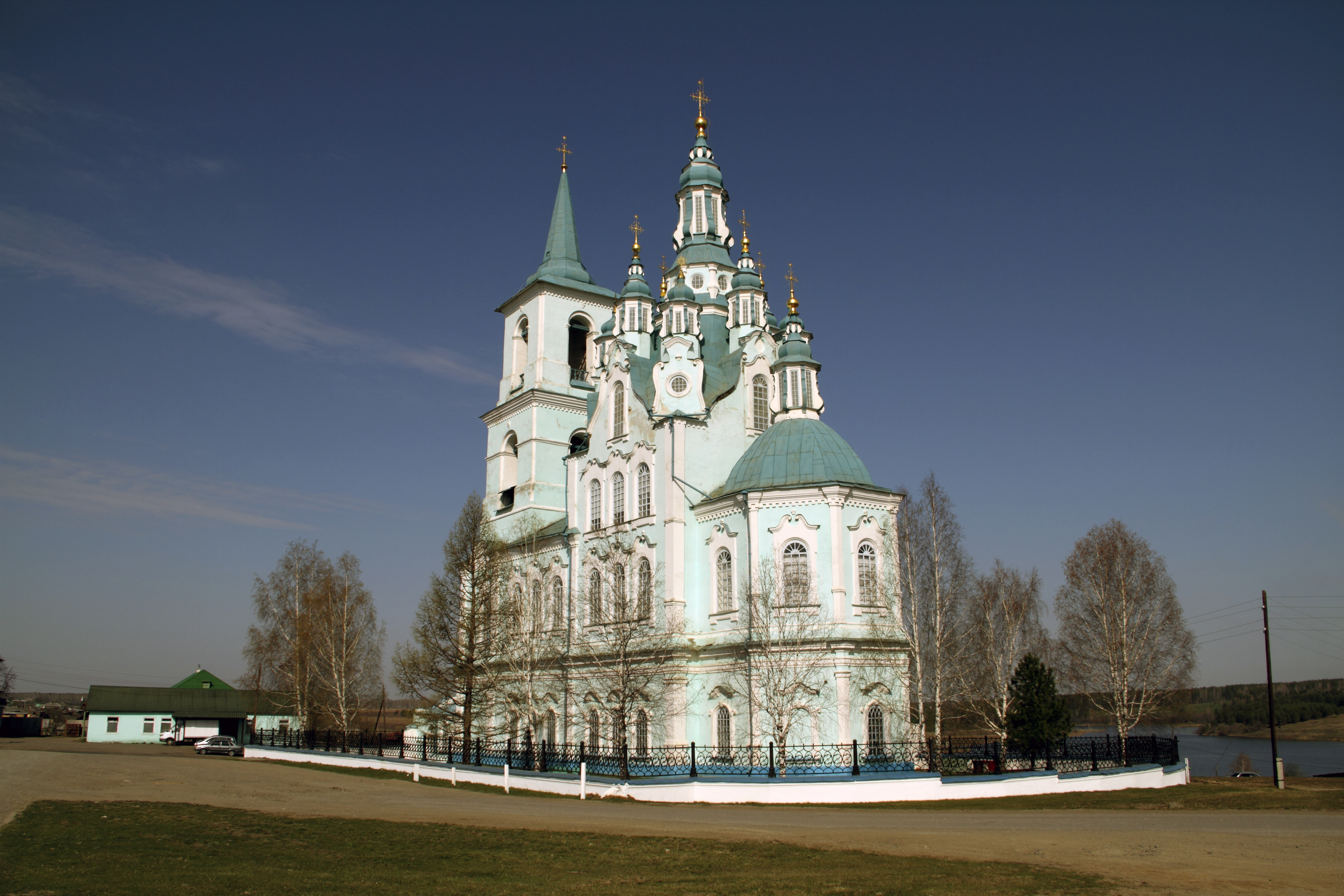 село Нижняя Синячиха в городском округе «МО Алапаевское» Свердловской области России